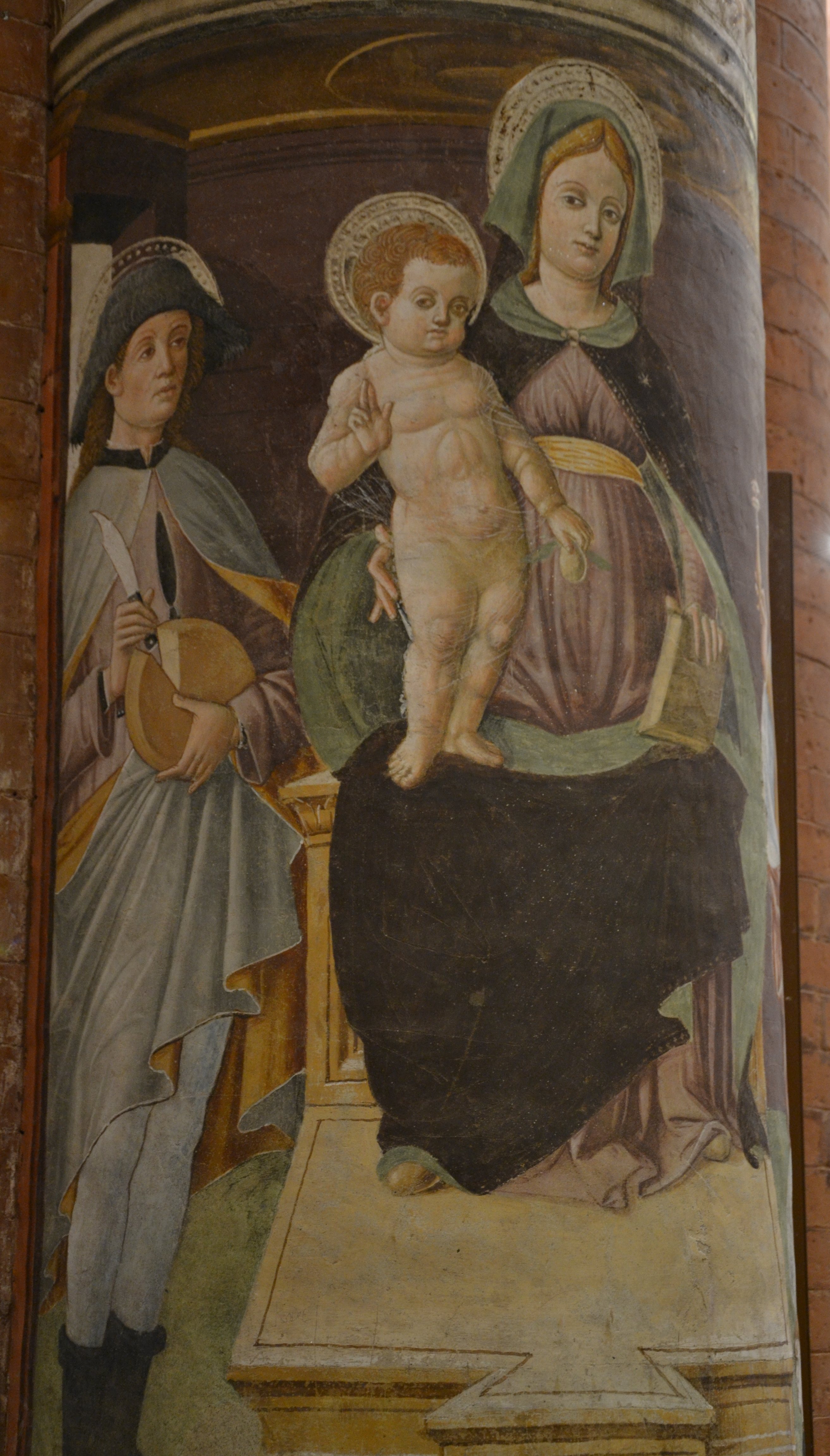 Chiesa di Santa Maria del Carmine (Pavia)